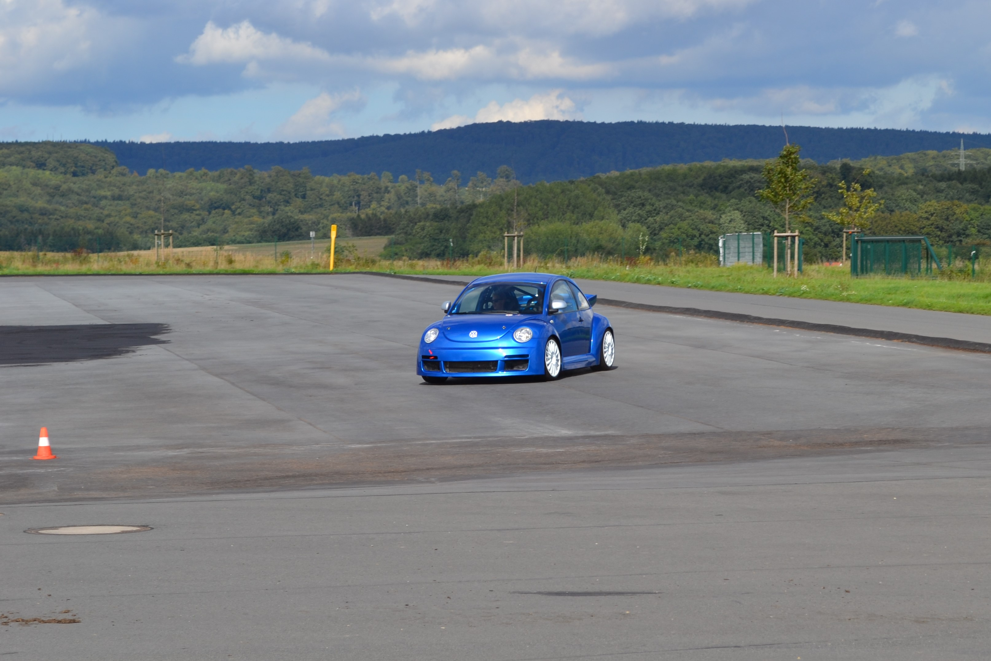 Originalzustand von 2002